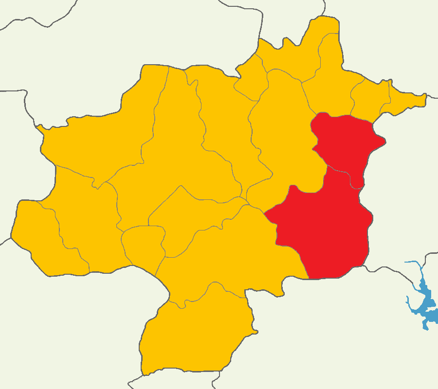 Sivas'ta 2014 Türkiye cumhurbaşkanlığı seçimi sonuçları